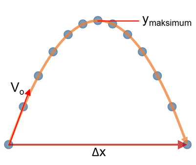 Plot lontaran bola